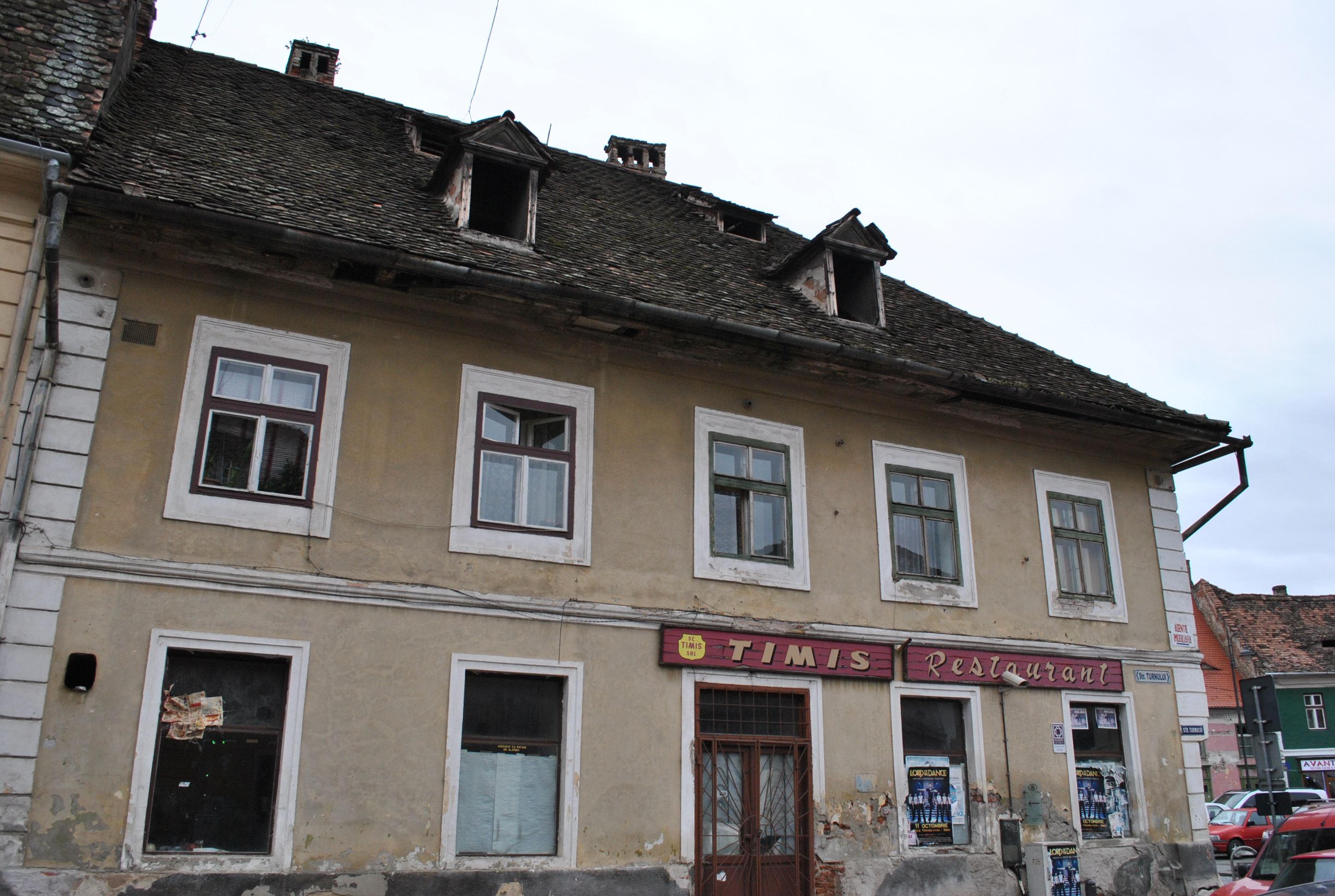 Casă, sec. XVI - XVIII, cu fragmente sec. XIV